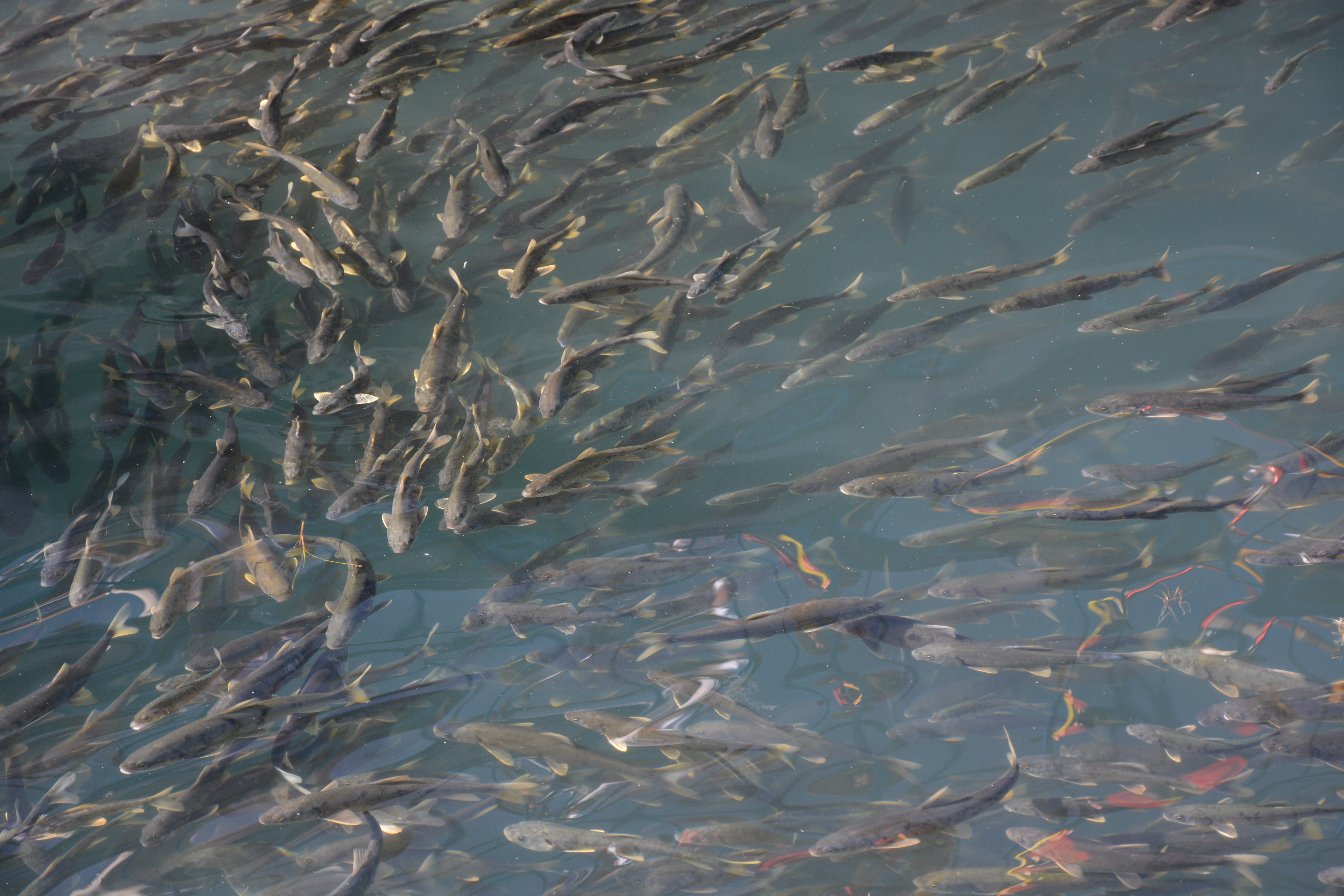 青海湖裸鲤（学名：Gymnocypris przewalskii）